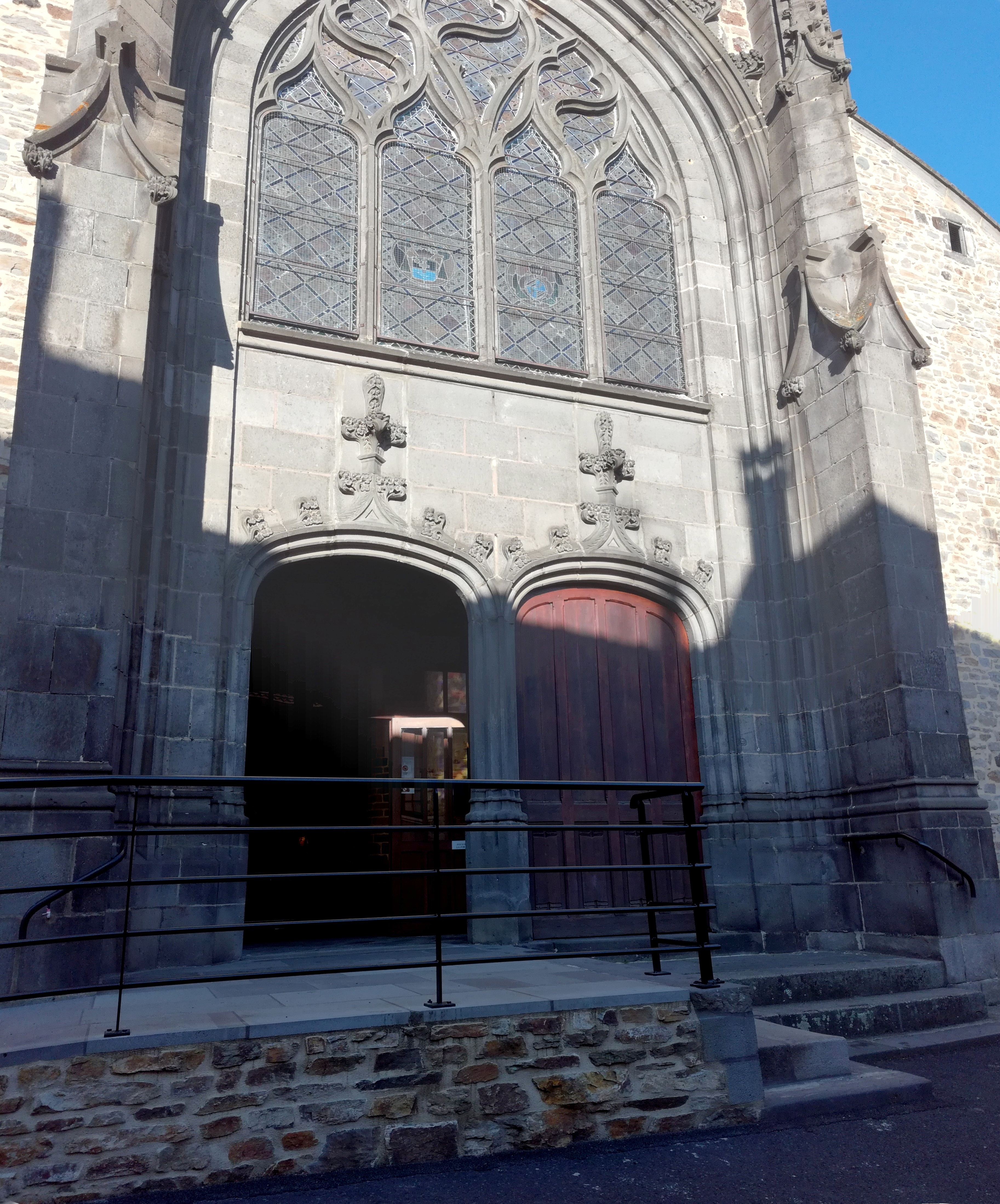 Façade modifiée en 2017 de l'église Saint-André de Massiac (Cantal - France)